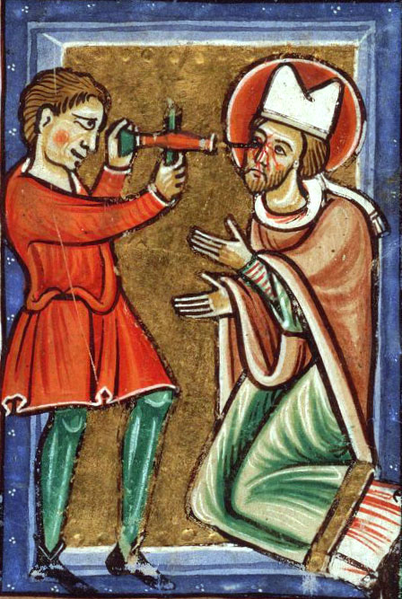 Martyrium vum Leodegar vun Autun aus enger illustréierter Bibiel ëm 1200